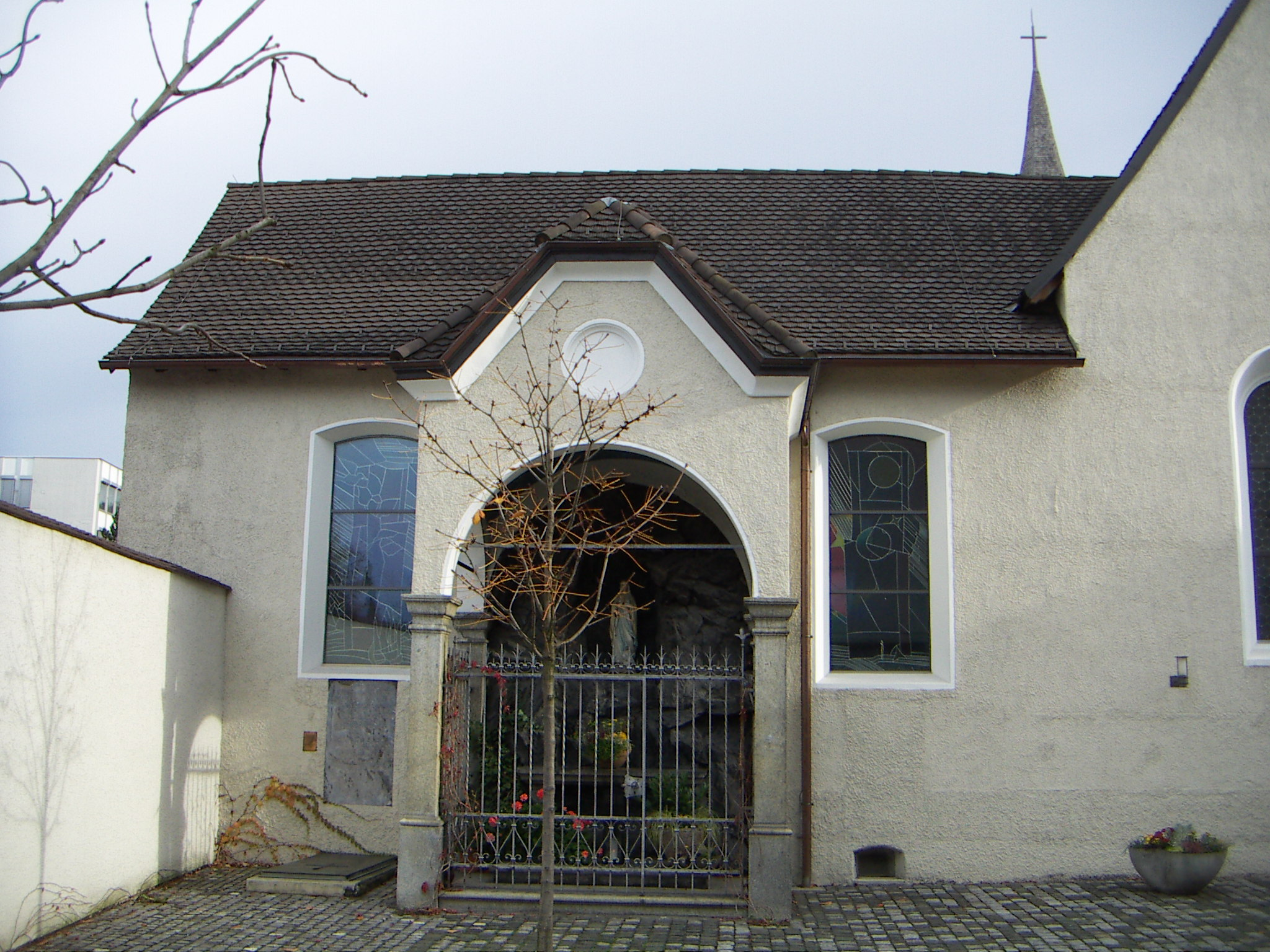 Kapuzinerkloster Feldkirch, Vorhof, Fideliskapelle, Grabstätte von Vogt Johannes Andreas Pappus von Trazberg, Rundbogenarkade mit Lourdesgrotte